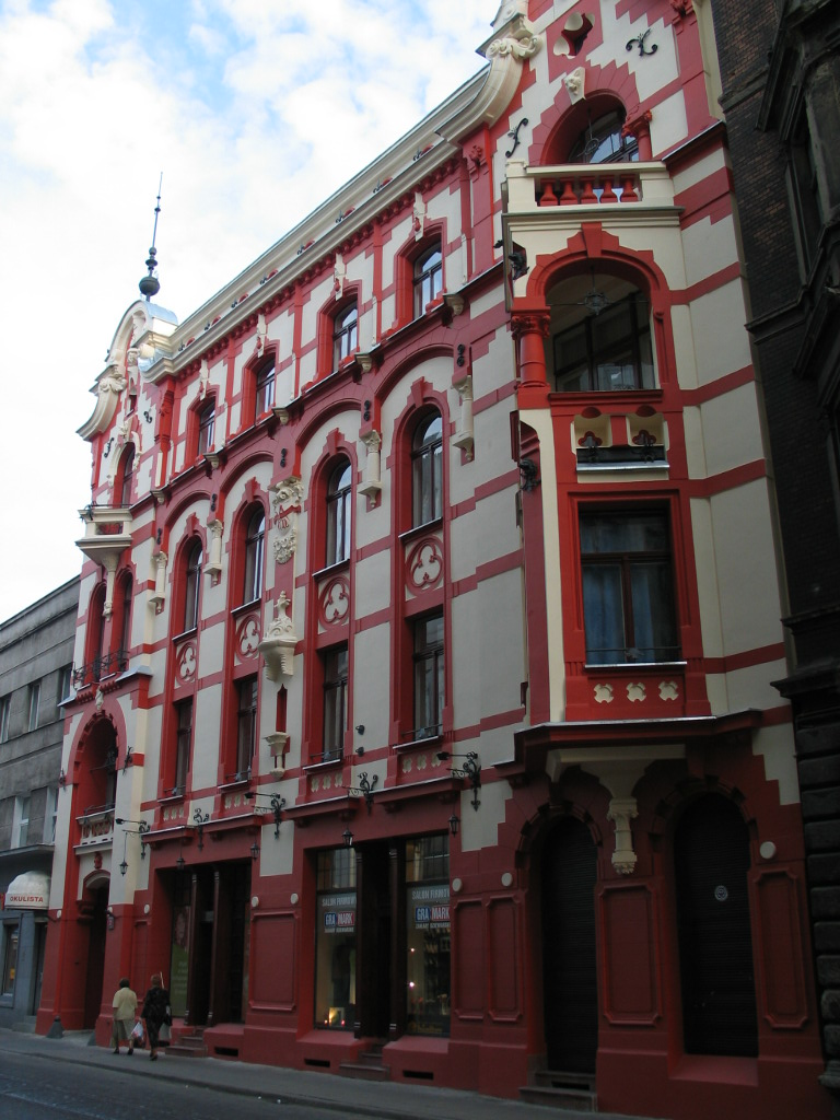 Kamienica Edwarda Lungena w Łodzi